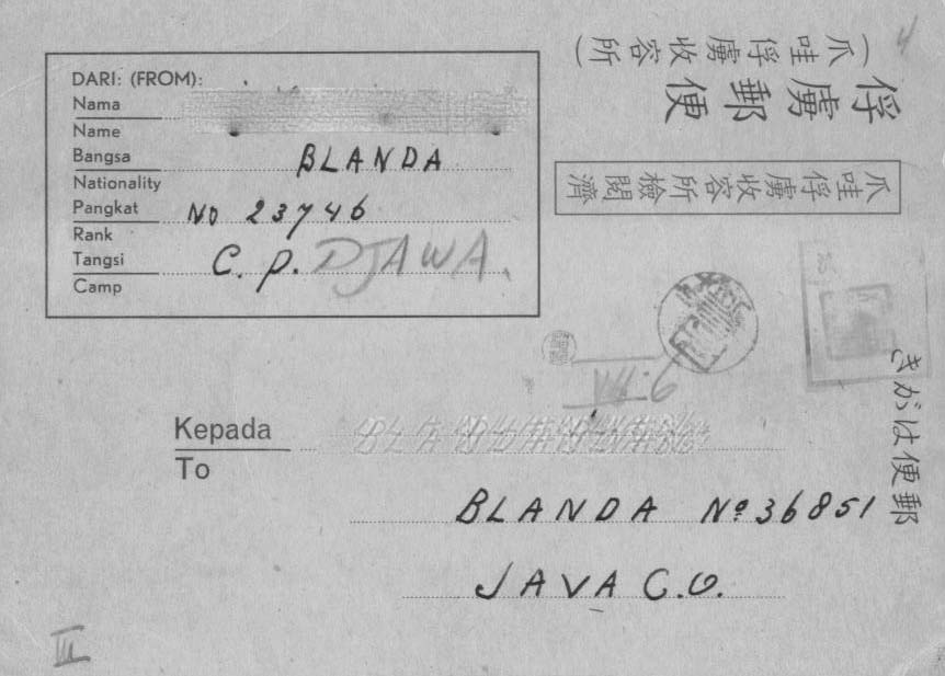 briefkaart jappenkamp